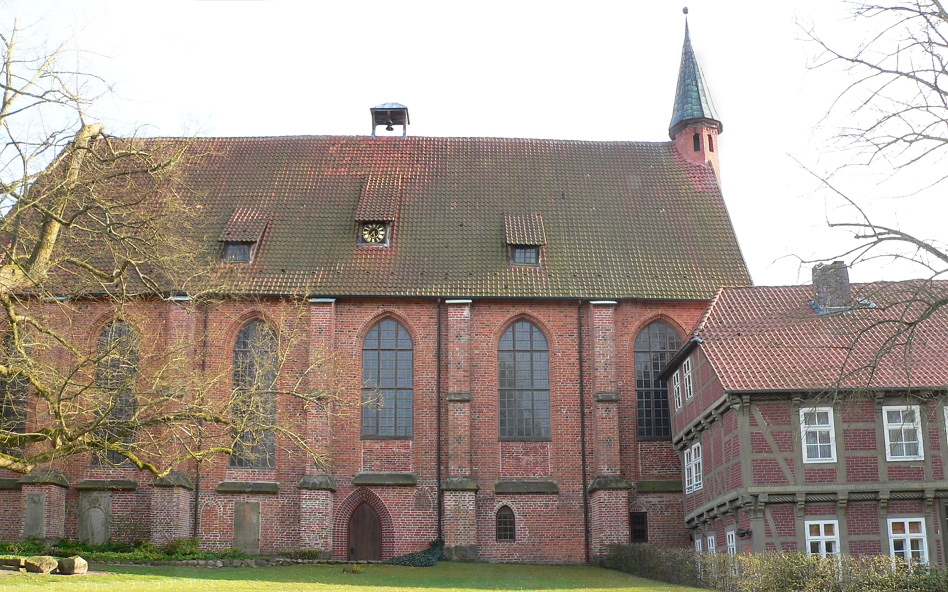 Klosterkirche Isenhagen Convent church at Isenhagen Abbey, Lower Saxony, Germany.